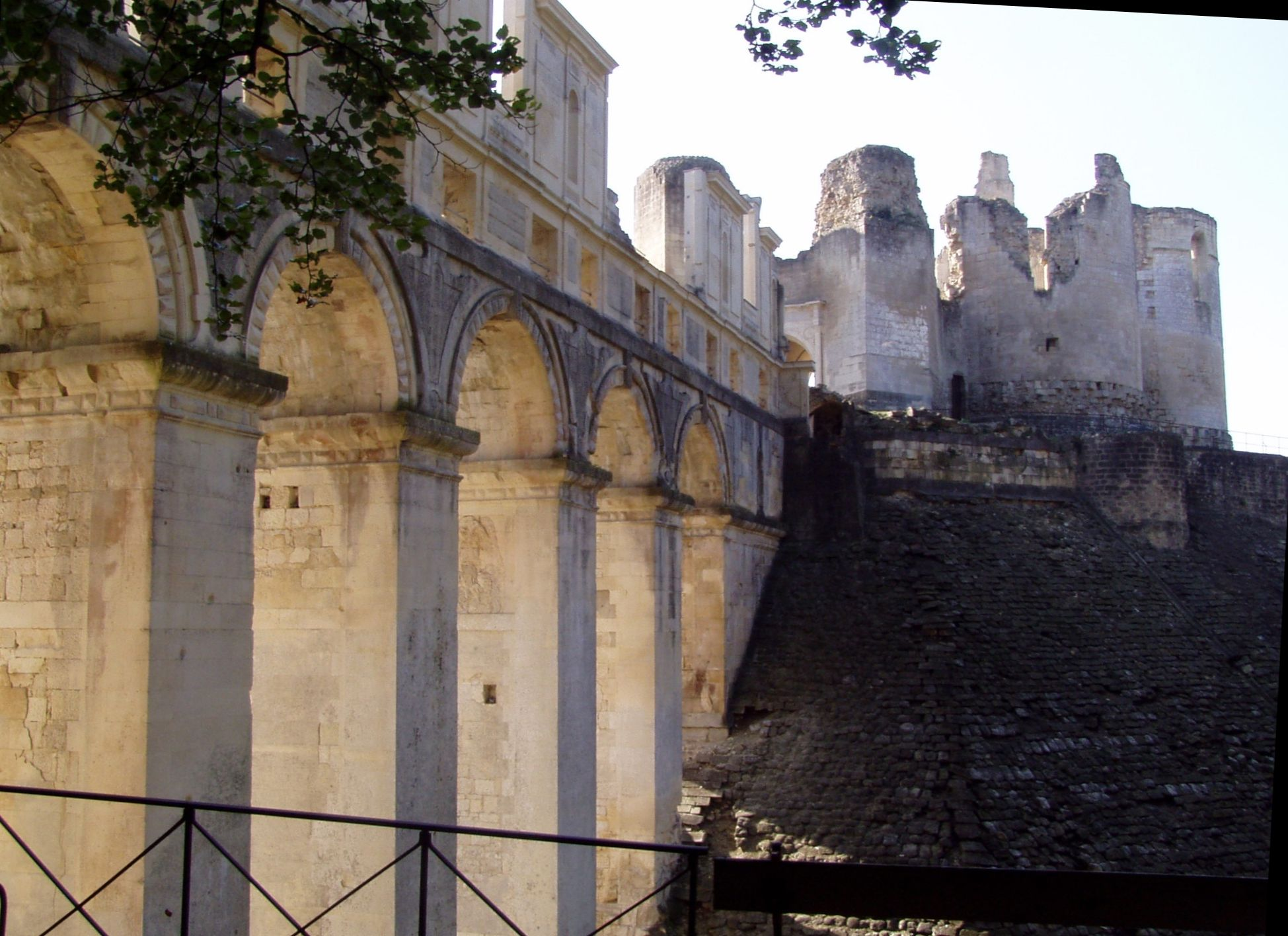 photographie du pont galerie du château de Fère-en-Tardenois, prise par Belgavoxle 17 octobre 2006.